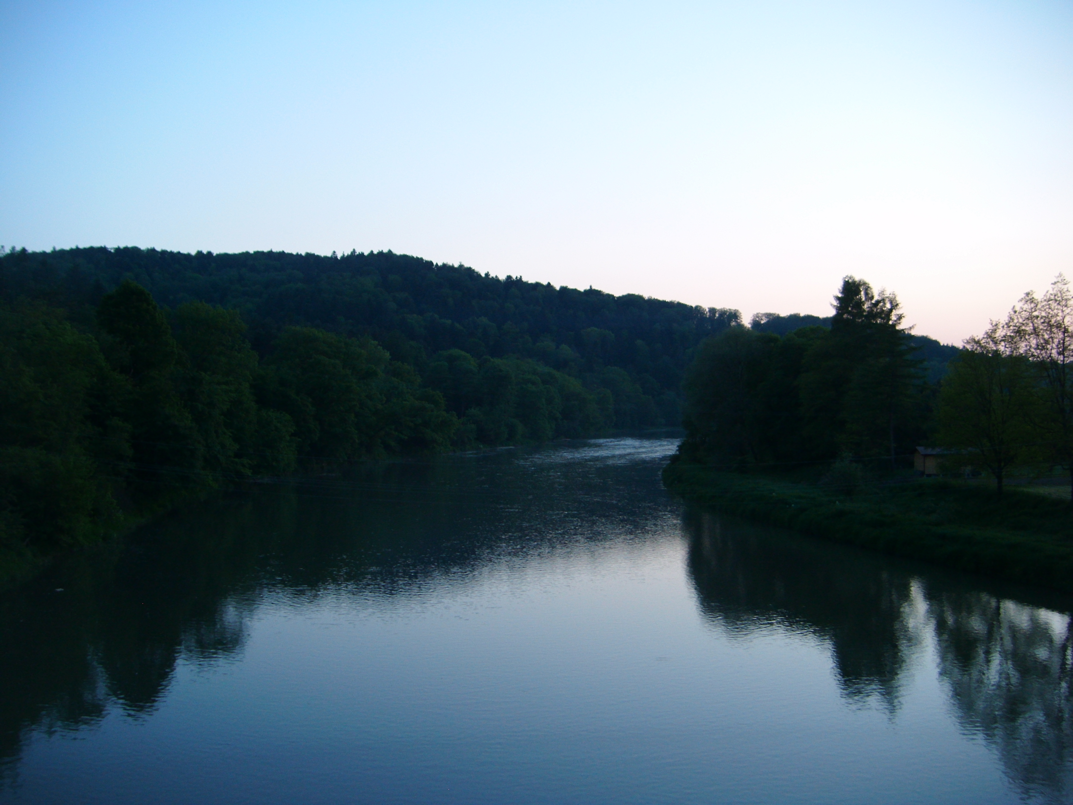 Widok z mostu Krasice na rzekę San